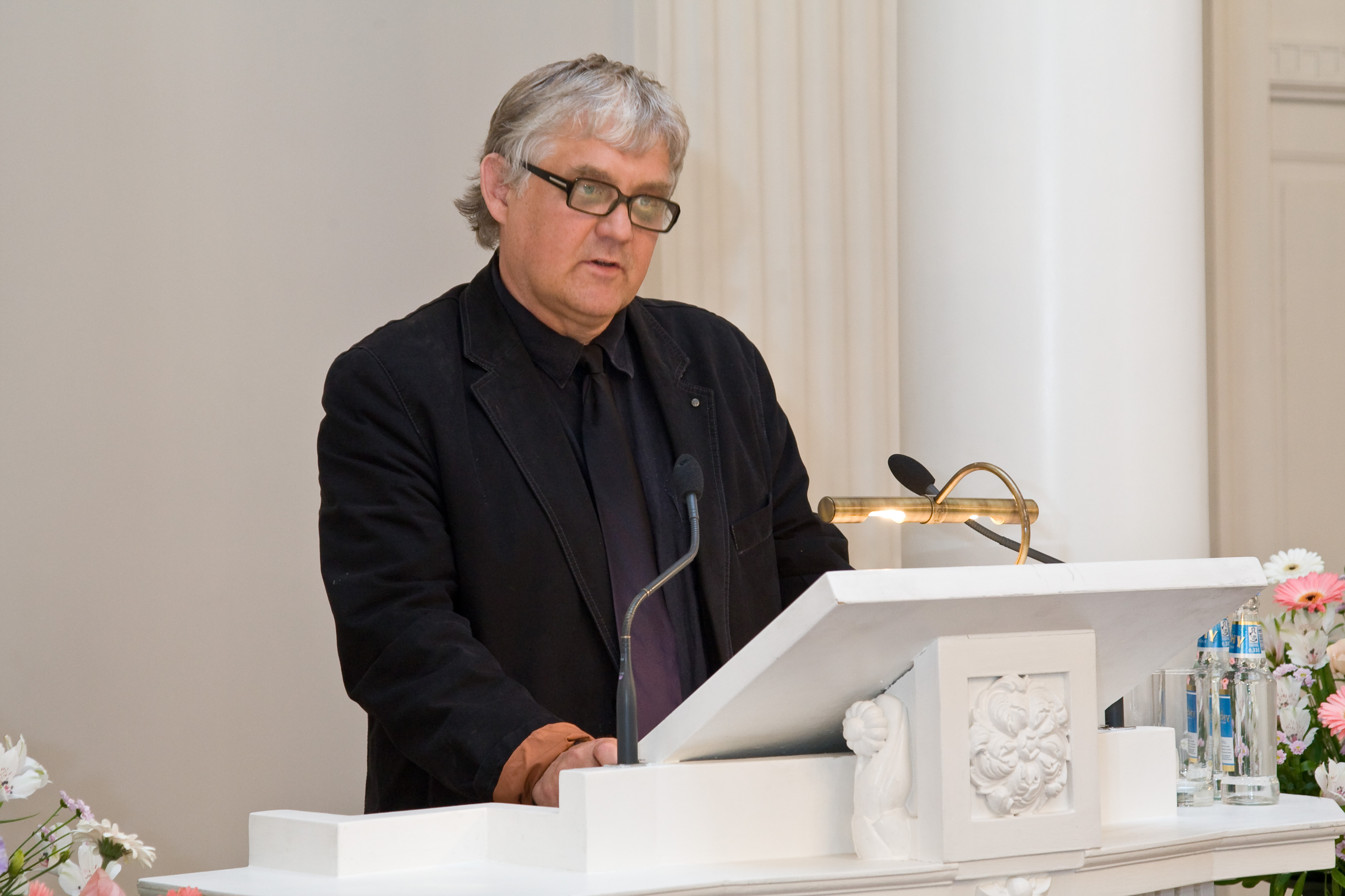 Tartu Ülikooli filosoofiateaduskonna magistriõppe lõpuaktus TÜ aulas 21. juunil 2008. Professor Juhan Maiste pidamas aktusekõnet.